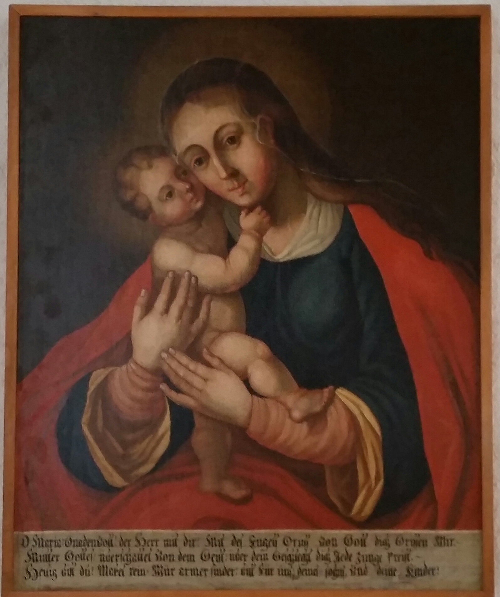 Gnadenbild Mariahilfkapelle Melchsee-Frutt 2018 (Am unteren Bildrand steht: "Oh Maria! Gnadenvoll! Der Herr mit Dir! Mit des Engels Gruss, von Gott dich Grüssen Wir Mutter Gottes! Überschattet von dem Geist! Über dein Geschlecht dich jede Zunge Preist. Heilig bist du! Makel rein. Mür armer sinder! Bitt für uns, deines Sohns, und deine Kinder." Quelle: Kurt Zumbrunn: Melchsee-Frutt im Laufe der Zeit. Grischa Verlag, Thusis 2015; S. 260)